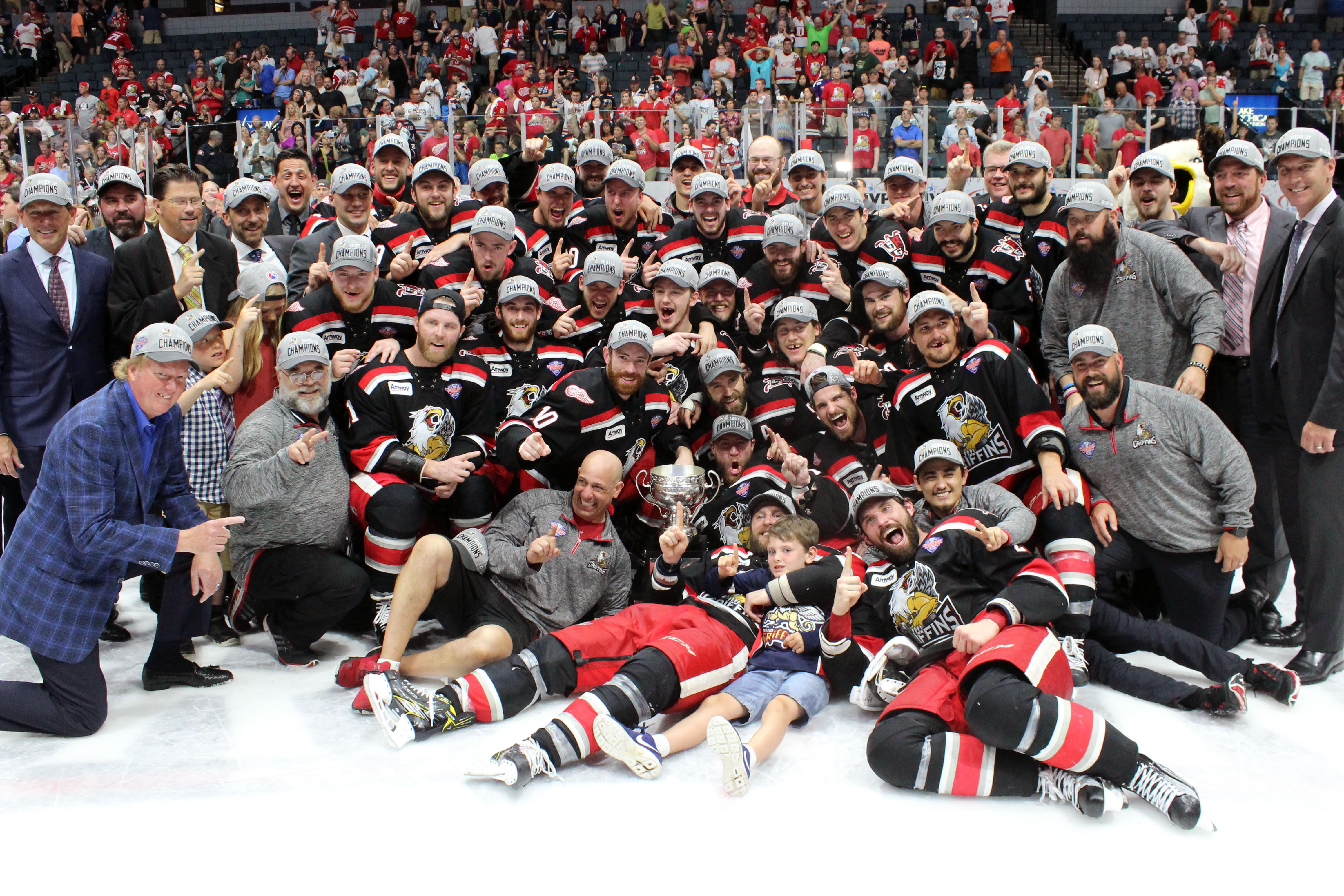 2017_team